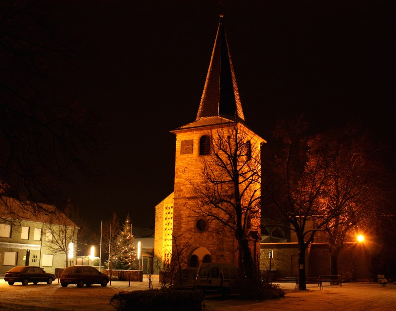 St. Johannes Evangelist Kirche Bad Westernkotten Informationstafel am Turm: 1699 errichtet, 26m hoch, ist der Turm das einzige erhaltene Bauteil der 1976 abgerissenenalten Renaissancekirche. Barockes rundbogiges Portal mit Pfeilereinfassung. Die Inschrift lautet: Zu Ehren des hl. Evangelisten Johannes, des Kirchenpatrons, haben die Westernkötter diese Kirche in Demut errichtet. Das Chronistikon weist wie die Maueranker auf das Baujahr 1699 hin. Darüber in einer Muschel das in Sandstein gehauene Bild des Kirchenpatrons. Der Schlußstein zeigt einen Engelskopf und das Ortswappen, ein Sälzer- oder Pfannenhaken. Im Inneren der Marienkapelle ist eine wertvolle Pietà von 1780 erhalten. Die Fenster, 1979 von dem Essener Künstler Nikolaus Bette gestaltet, zeigen: Mariä Verkündigung, Mariä Heimsuche, die Geburt Jesu und die Verehrung Jesu und seiner Mutter durch die Heiligen Drei Könige. Der Turm ist als Baudenkmal in die Denkmalliste der Stadt Erwitte eingetragen.